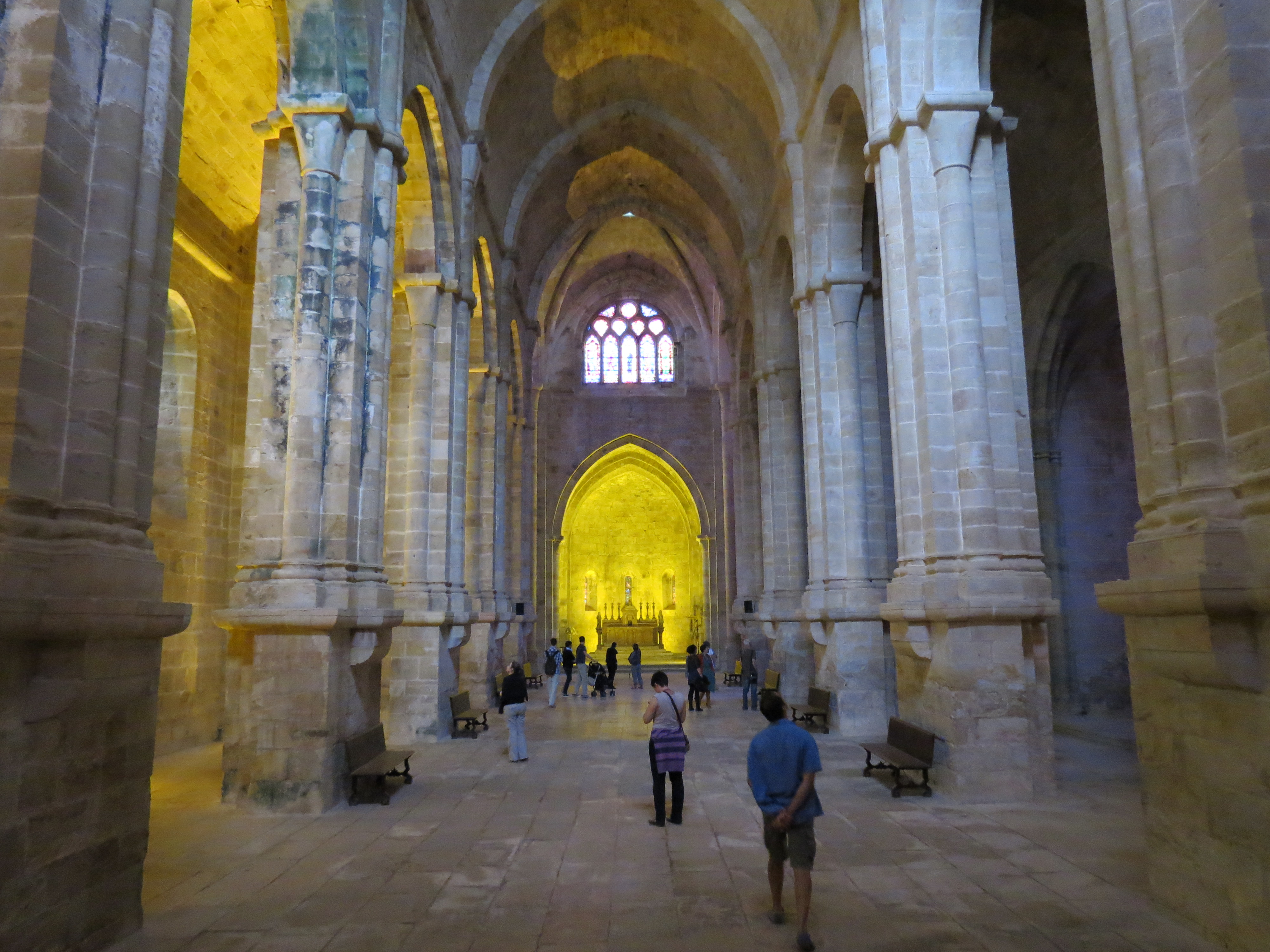 Abbaye de Fontfroide, Narbonne, Aude, Languedoc-Roussillon.